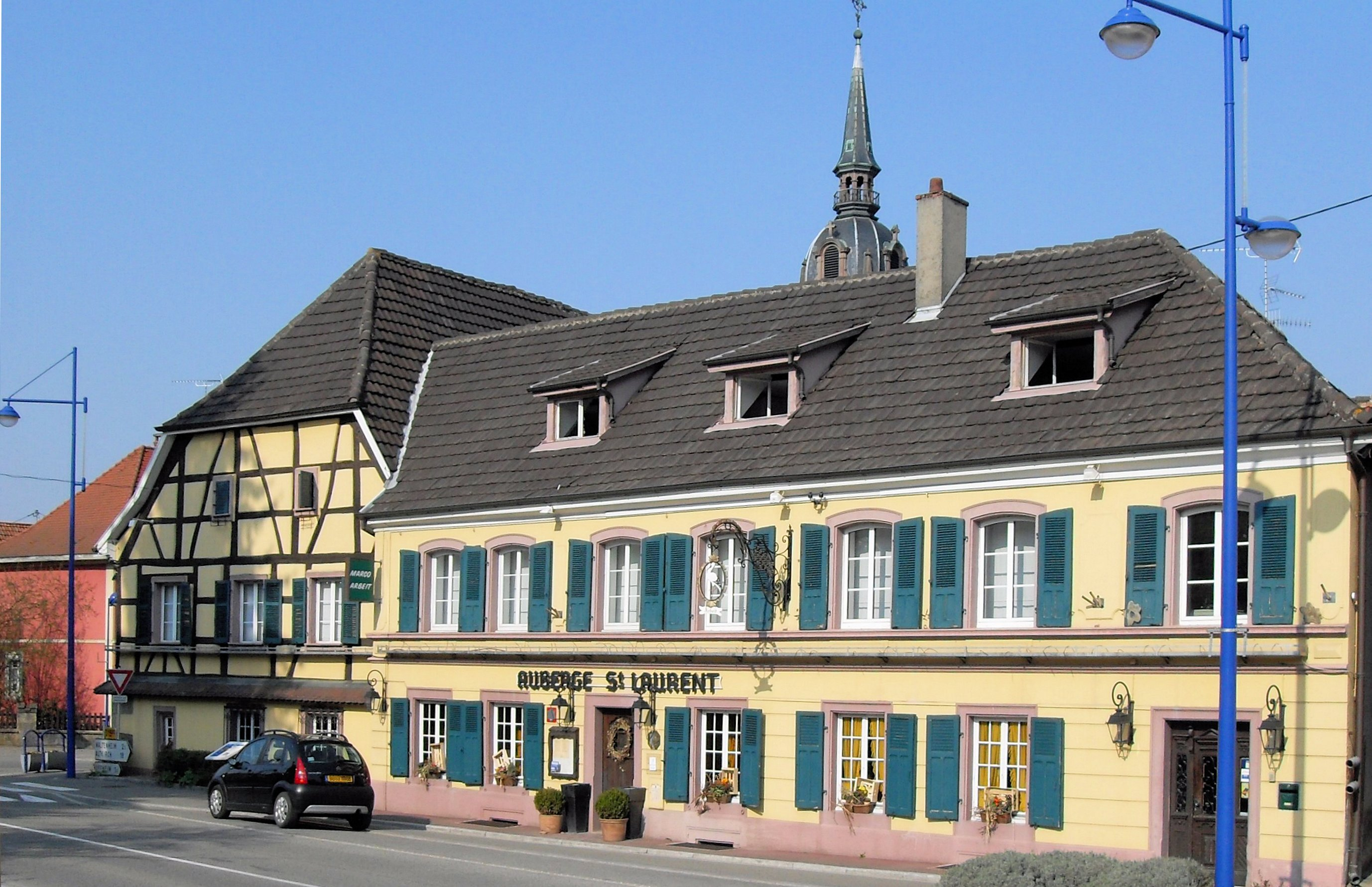 L'auberge Saint-Laurent à Sierentz